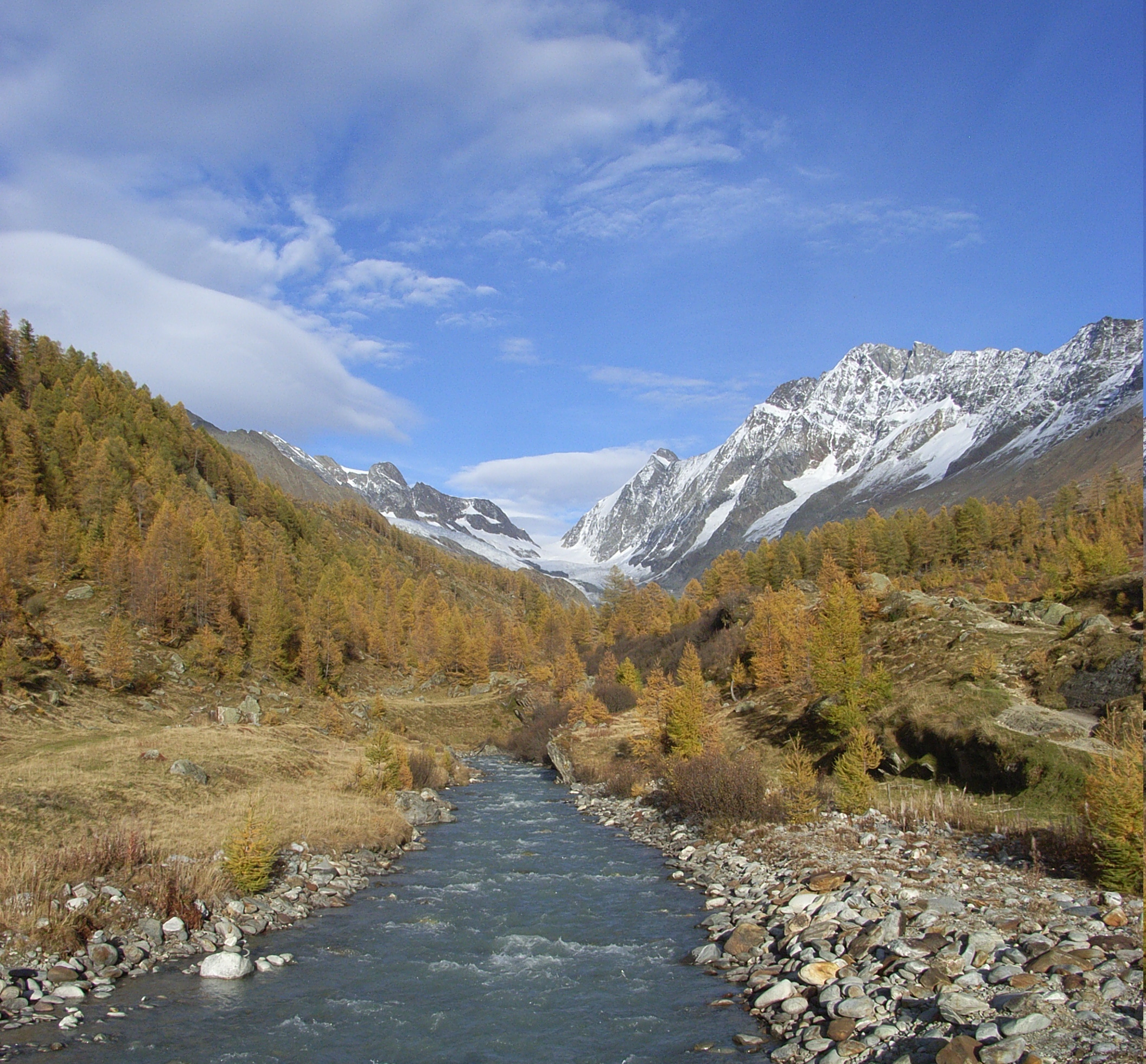 Die Lonza im Herbst